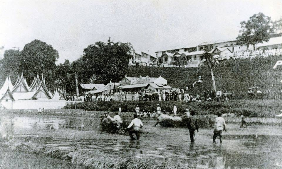 Pacu jawi yang dilakukan dekat Surau Syekh Bantam.